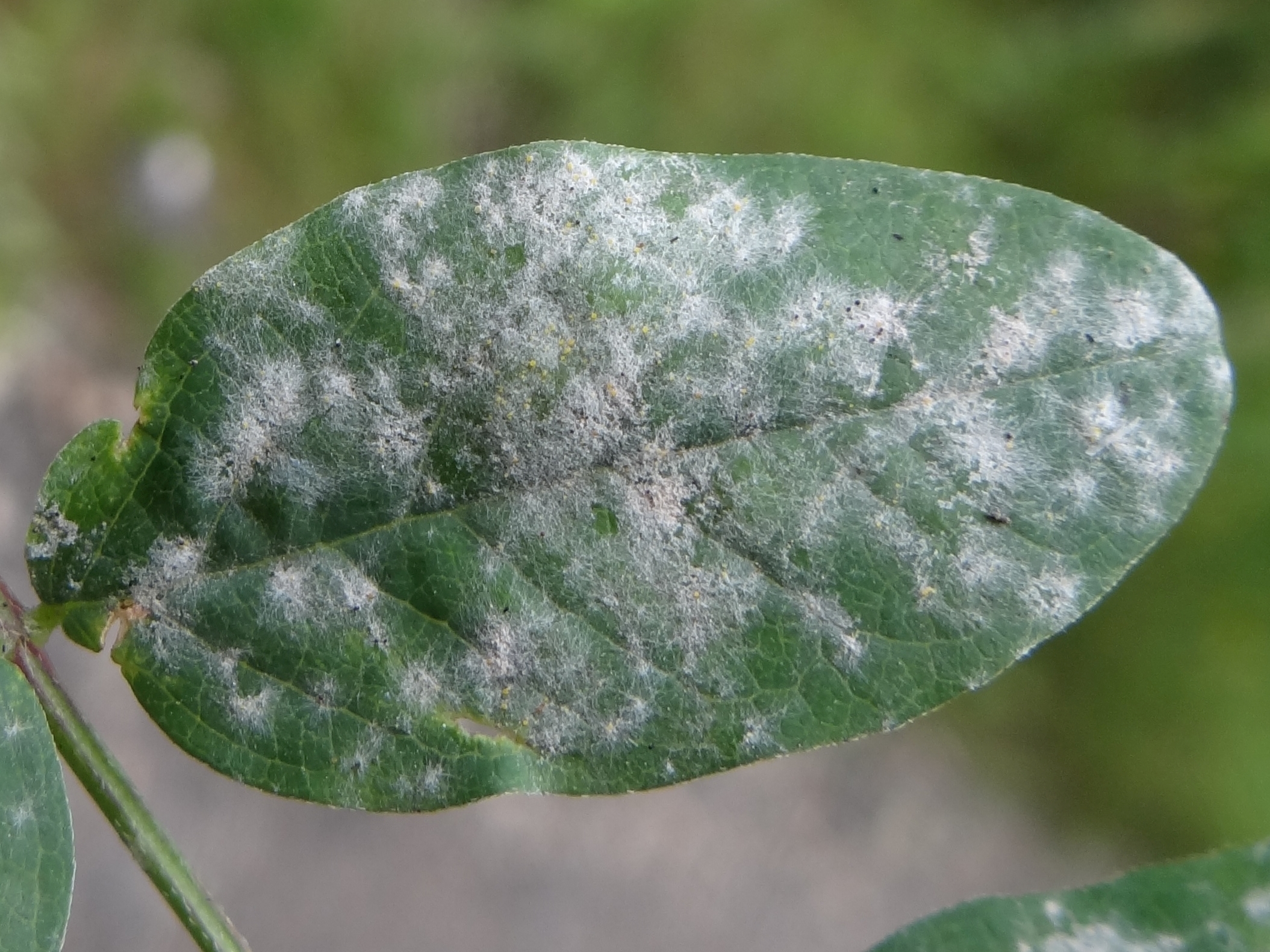 Erysiphe pisi var. pisi on leaf Astragalus glycyphyllos. Location: Poland, Smoleń (województwo śląskie), Dolina Wodącej